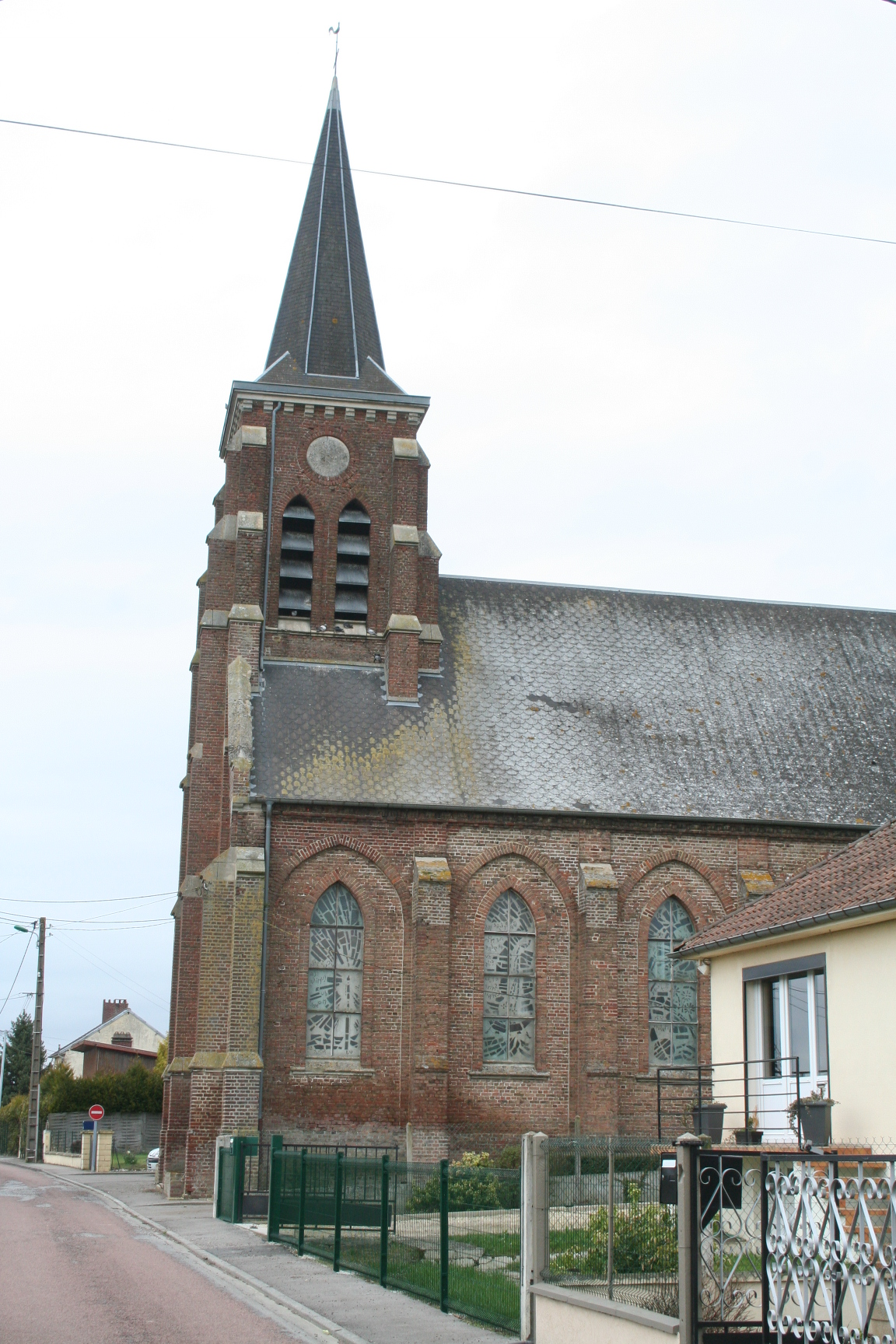 Picard: Église éd Domartin (Sonme) - Picardie